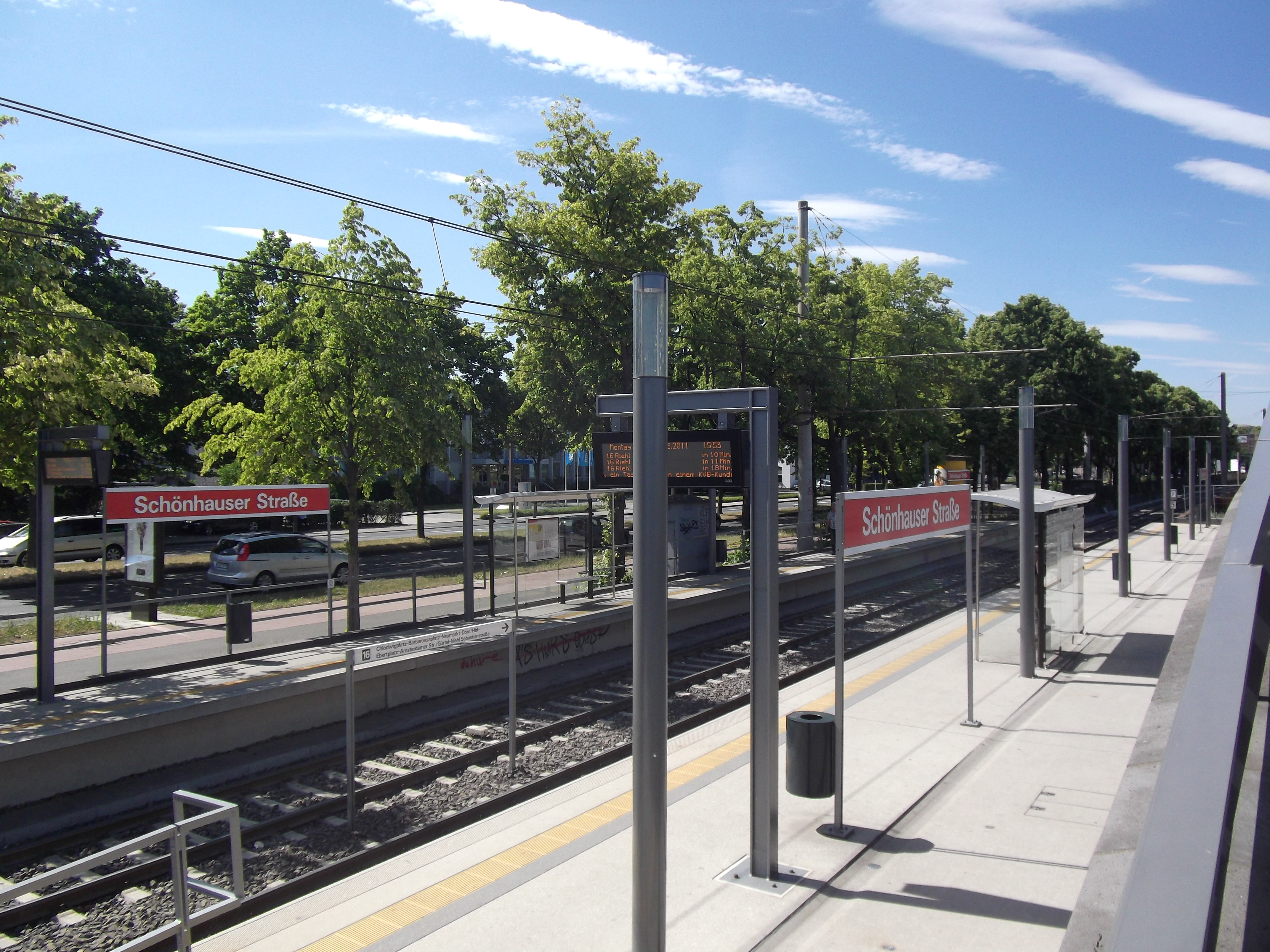 Cologne (Köln); Germany: Köln-Altstadt-Süd: Schönhauser Straße KVB station